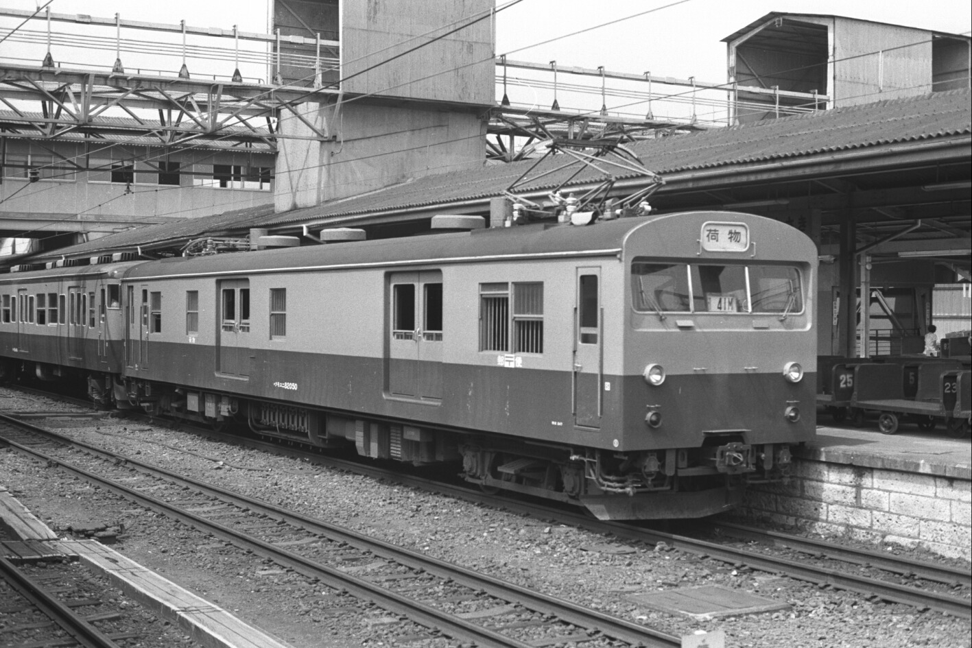 JNR Kumoyuni-82050 at Takasaki-Sta., JAPAN （国鉄 クモユニ82050、高崎駅)